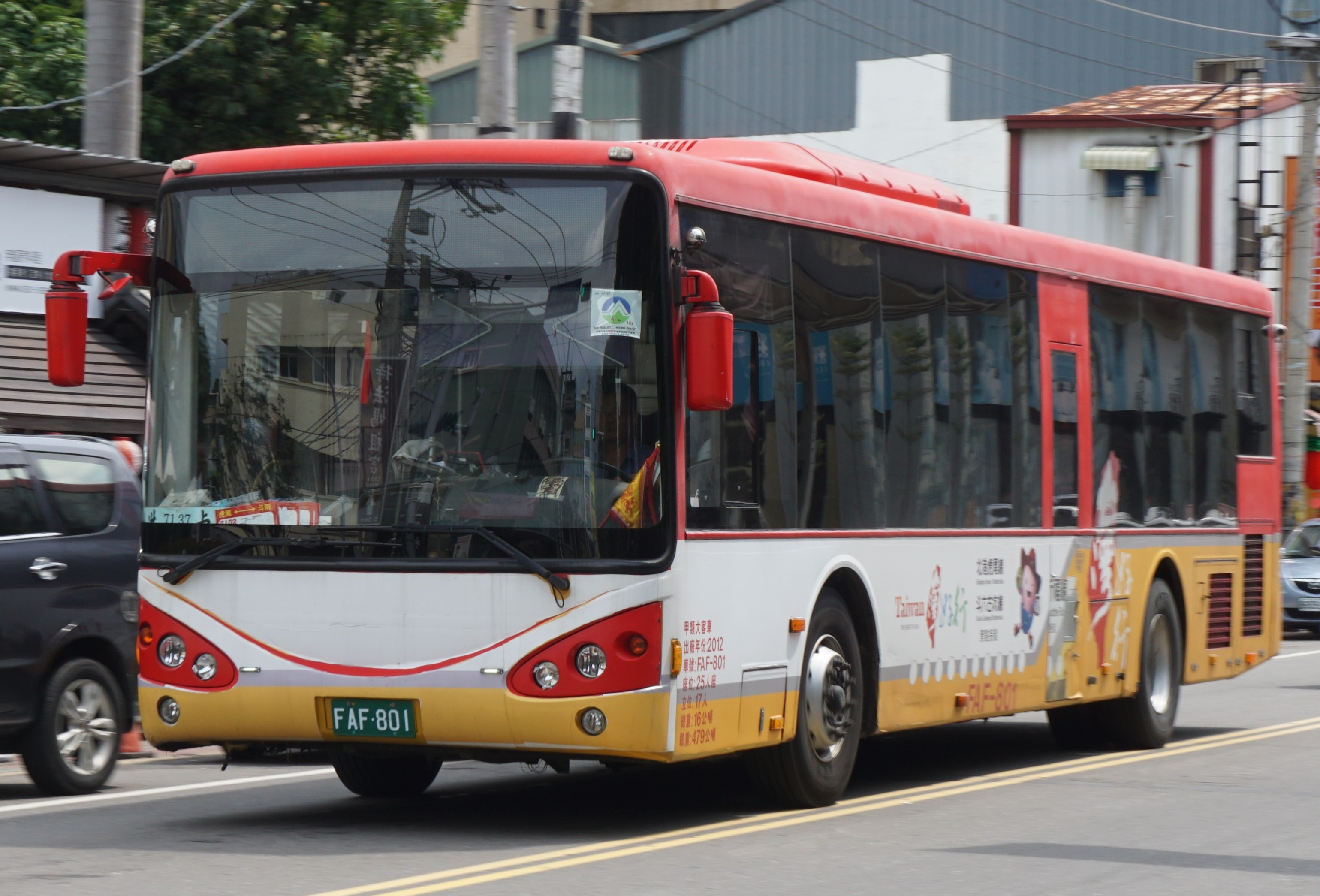 FAF-801行駛台灣好行北港線